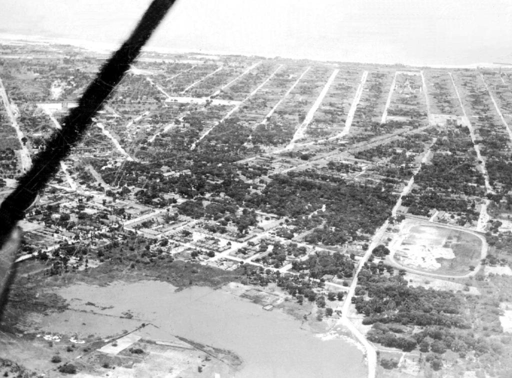 vFoto aerea Campo do Prado década 1930 Praça do Ferreia com Coreto na década de 1920 e vista do Cine Majestic.